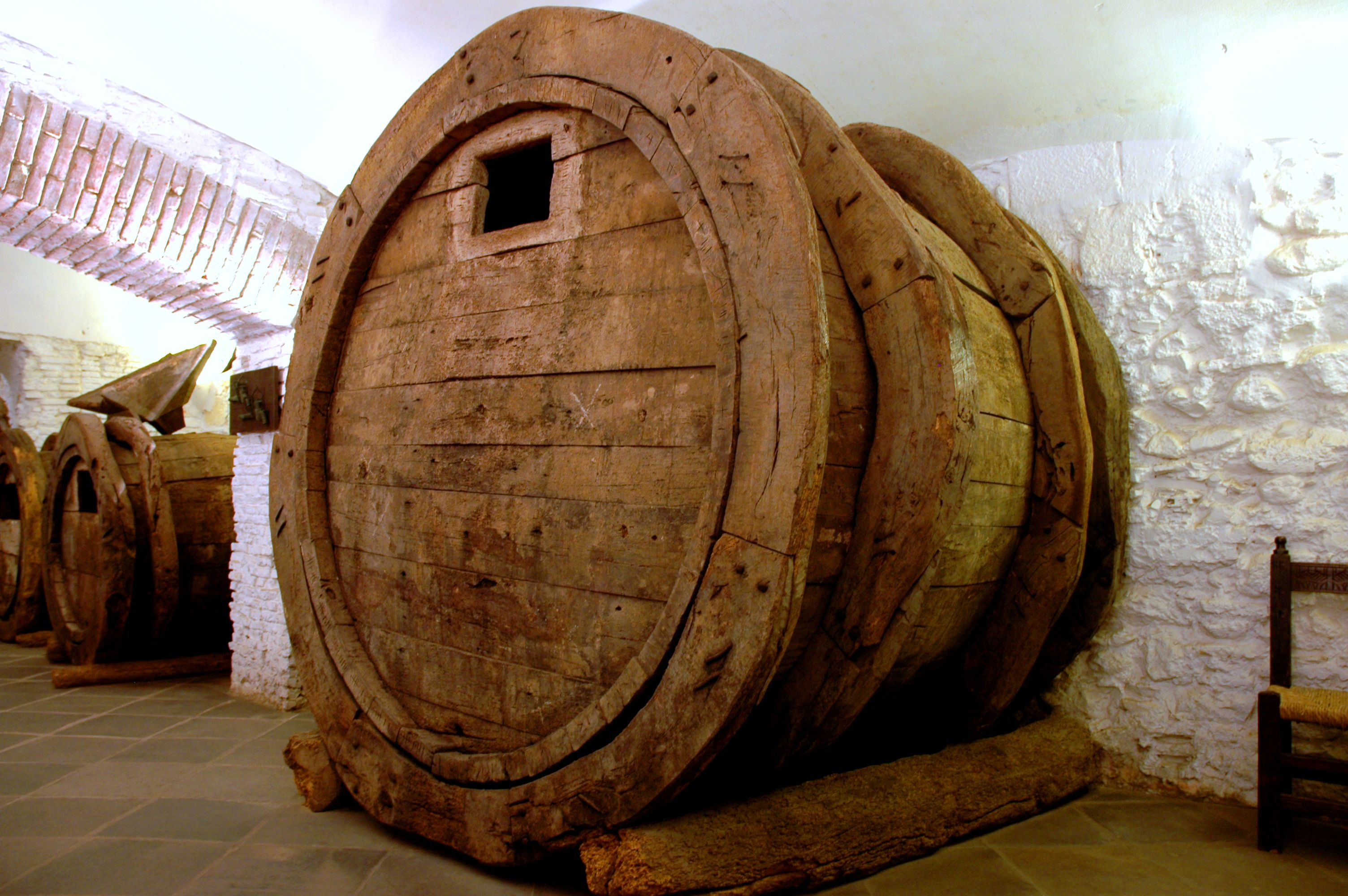 Peralada - Museu del Vi - Bota del Bages